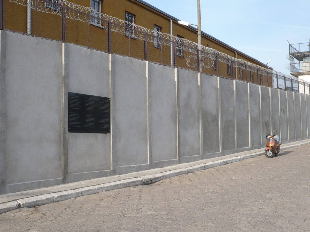 Łódź-Sikawa, tablica pamiątkowa byłego obozu pracy karnej (1943-1945) oraz obozu filtracyjnego dla Niemców (1945-1948); wg stanu na r. 2014.